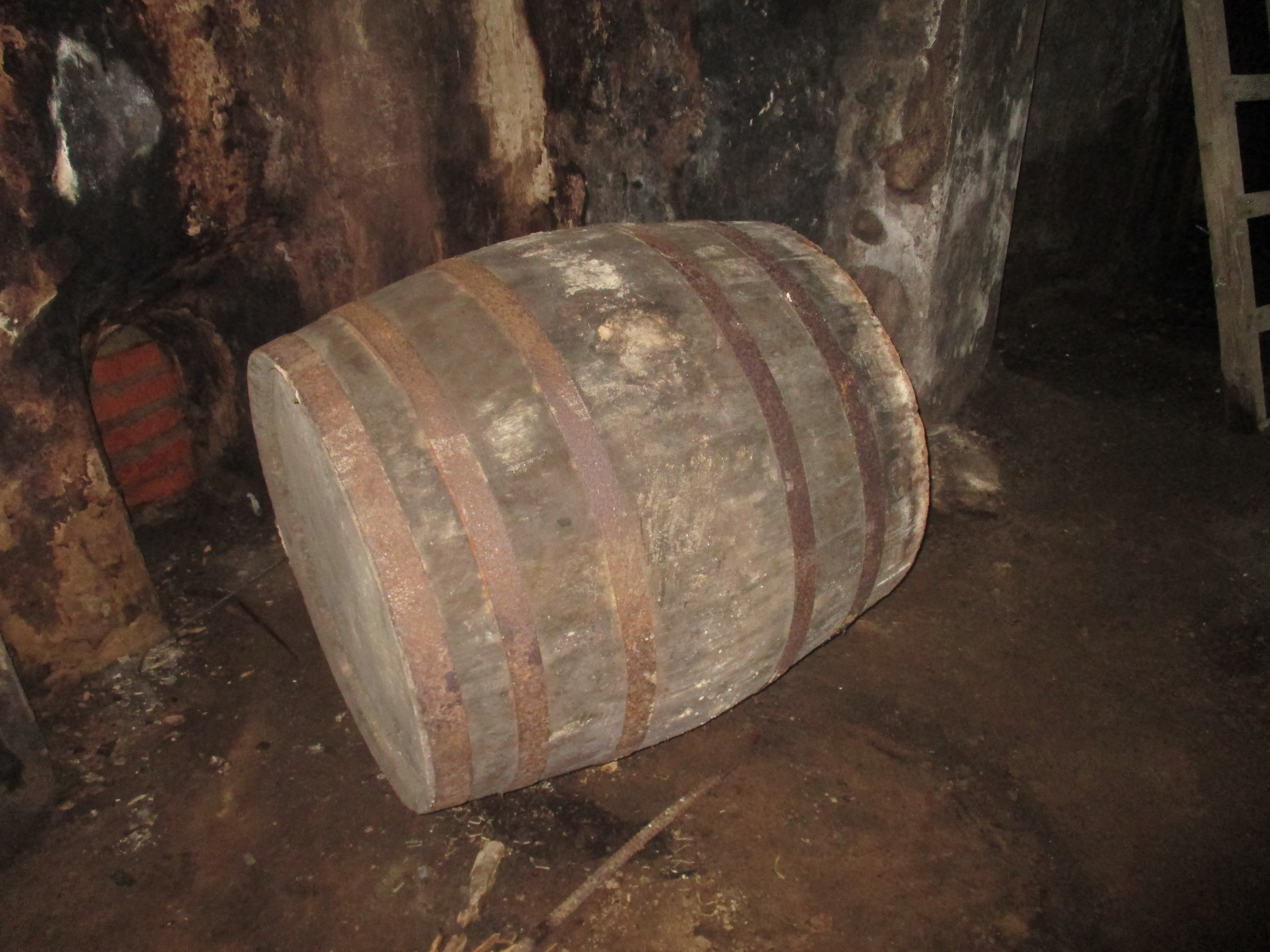 В подвале